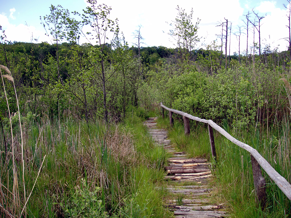 am Schwarzen See (Schlemmin, Bernitt, Mecklenburg-Vorpommern)